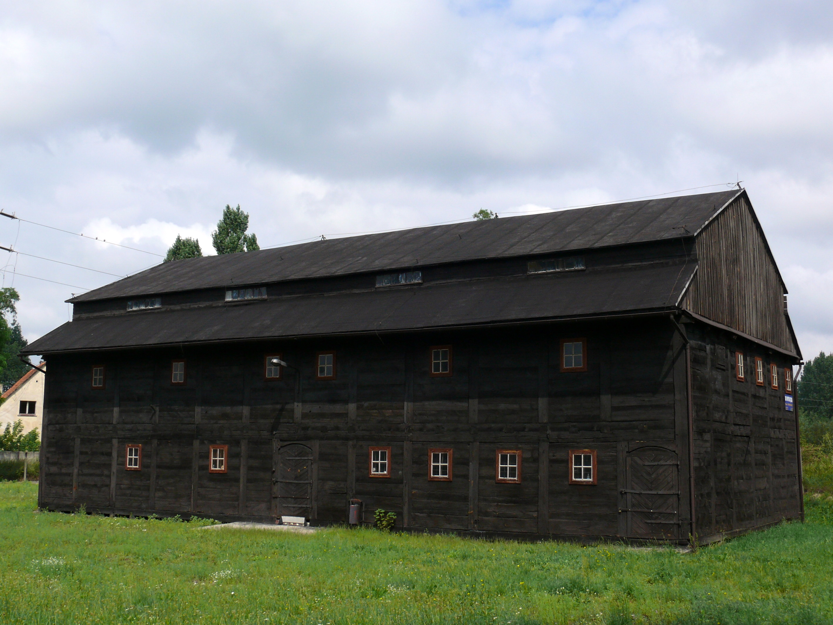 Spichlerz drewniany z XVIII w. w Kole, ul. Żelazna